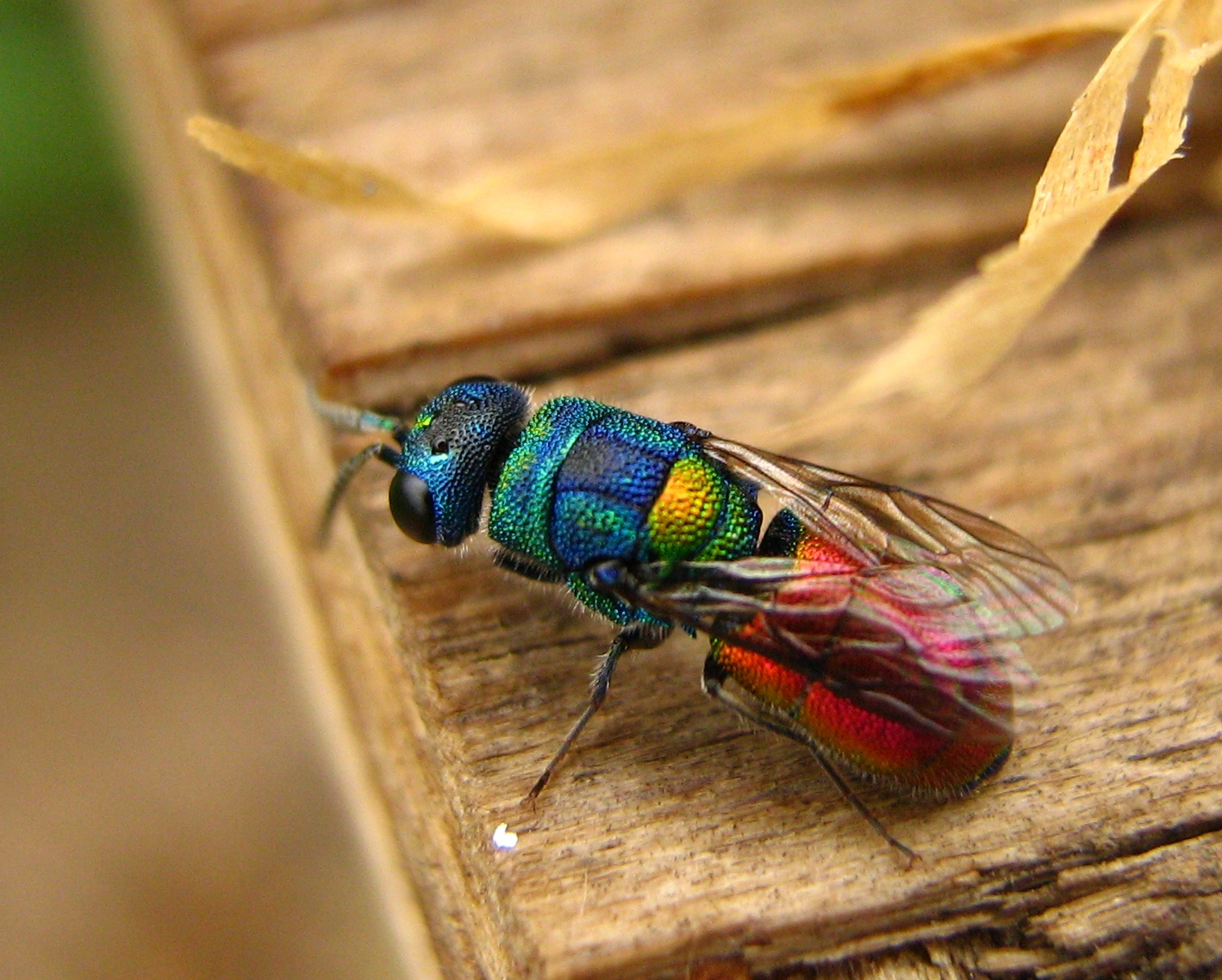 Оса з родини Chrysididae середніх розмірів, що широко розповсюджена на території Європи